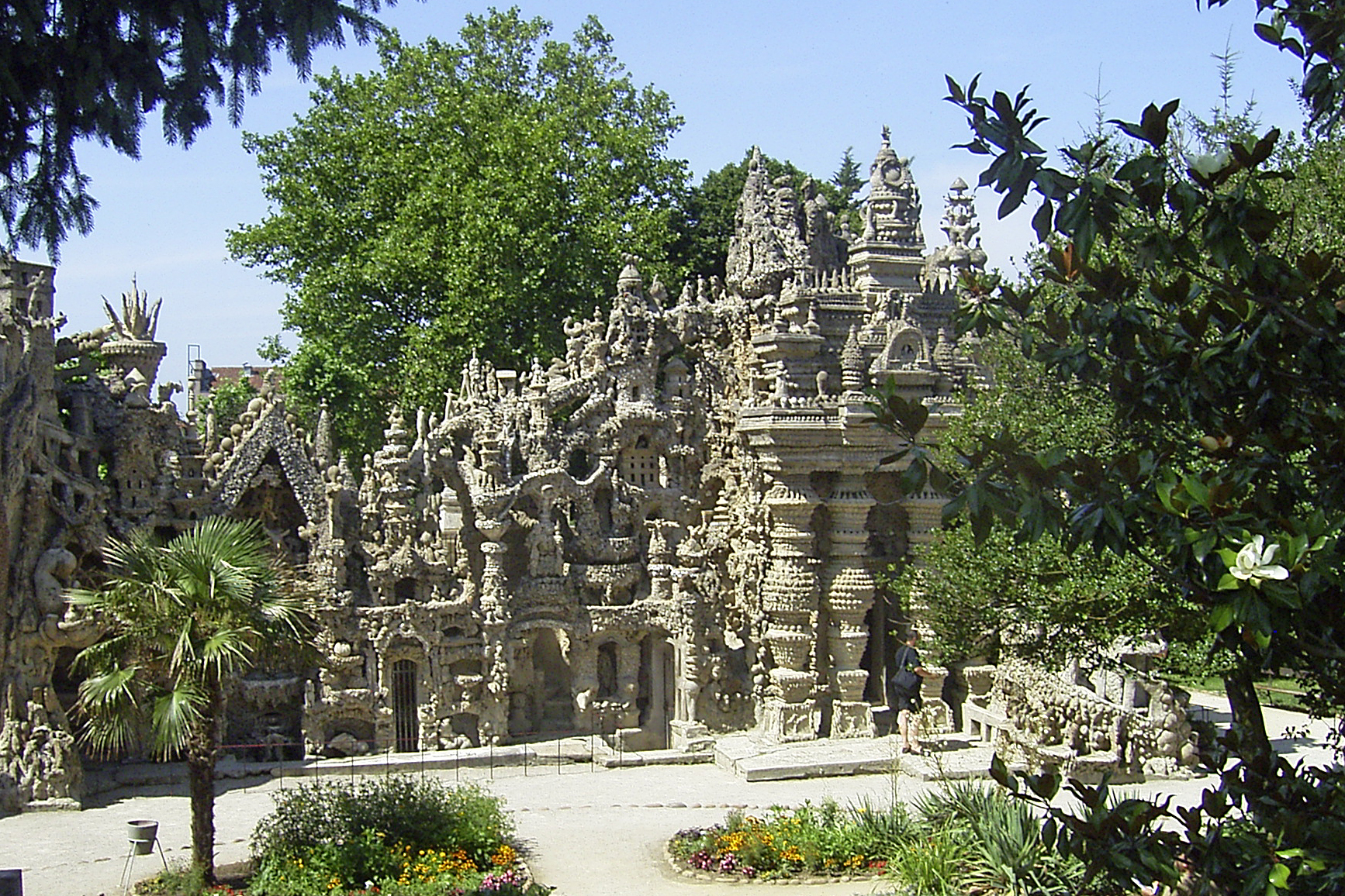 Palais idéal, Hauterives, France